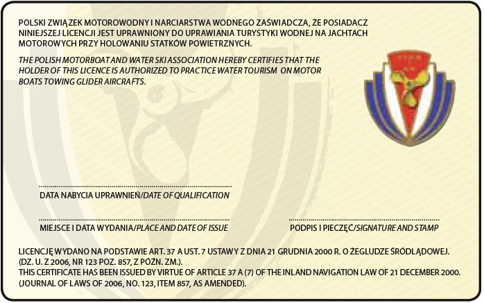 Wzór licencji do holowania statków powietrznych z 2013 roku. Rewers.